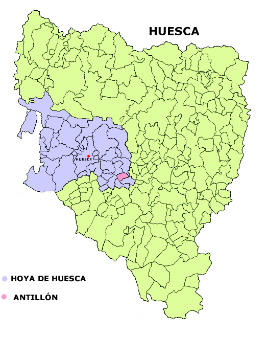 Mapa del municipio de Antillón Creado el 06.12.2005 por Dionisio en base a Image:Huesca municipalities.png